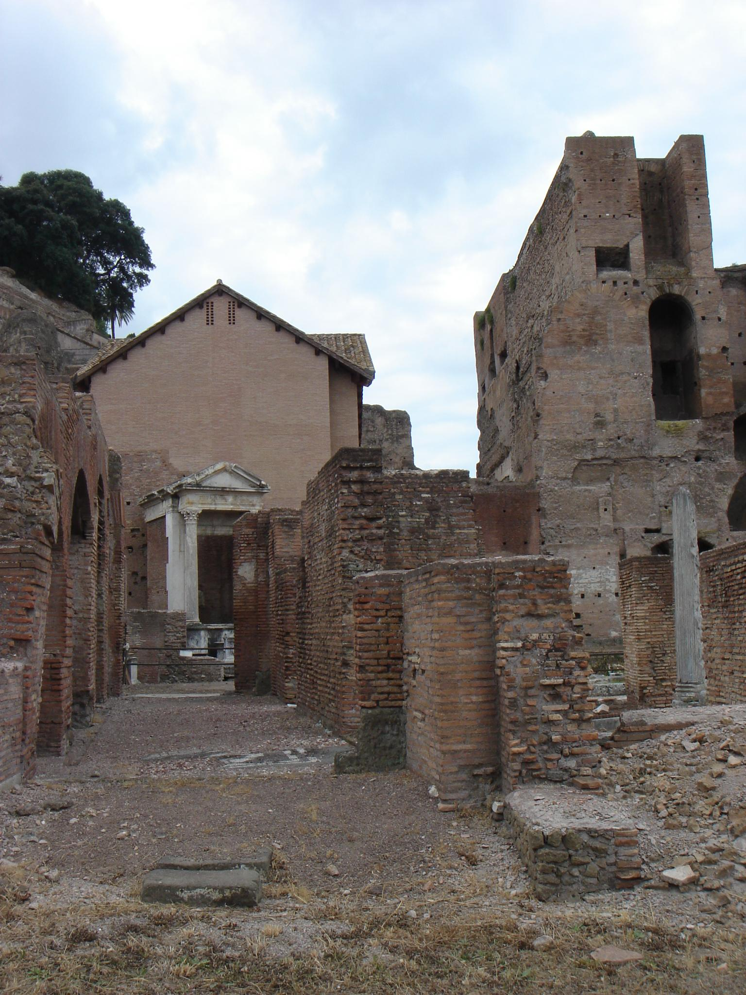 Roma, Foro romano: Santa Maria Antiqua.